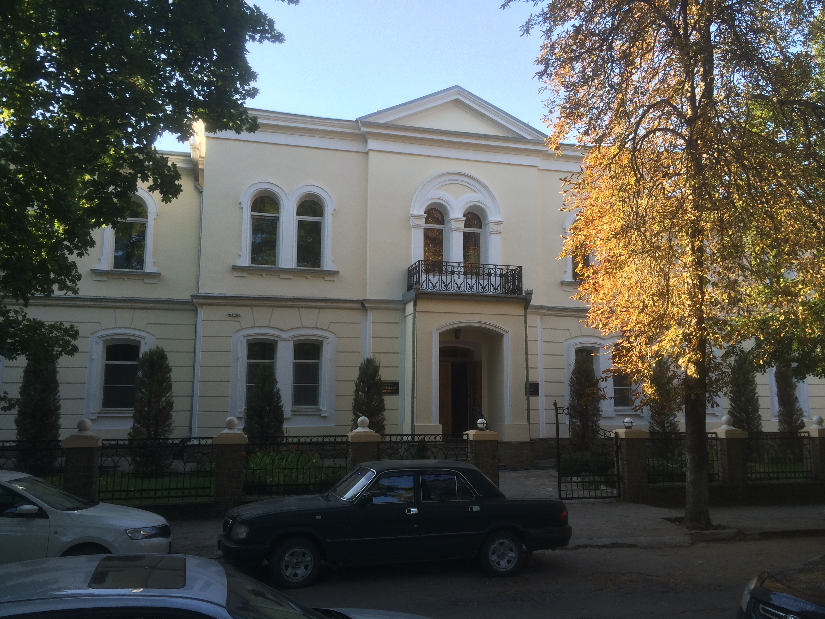 Будівля духовної семінарії (будівля, в якому знаходилася підпільна друкарня), XIX-XX вв., Сімферополь, вул. Героїв Аджимушкая, 9/ вул. Самокиша, 11, літер "А "